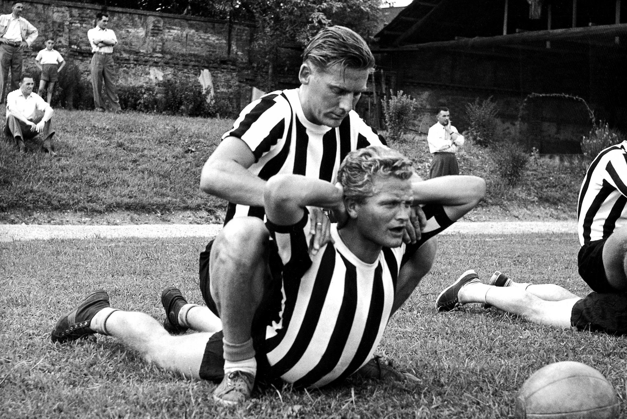 Torino, Campo Combi. Il calciatore danese Karl Aage Præst (in alto) e l'italiano Giampiero Boniperti (in basso) in allenamento alla Juventus tra gli anni 40 e 50 del XX secolo.